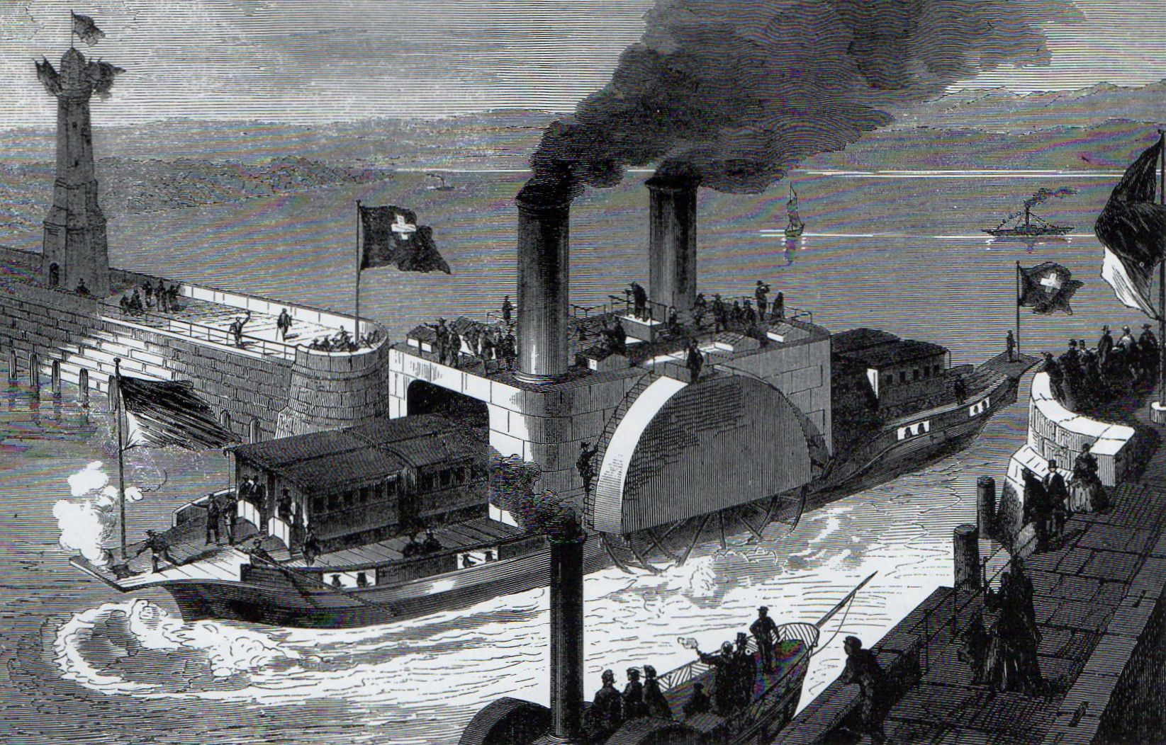 Dampftrajekt I trifft in Friedrichshafen ein. Im Vordergrund die 1854 erbaute "Olga"